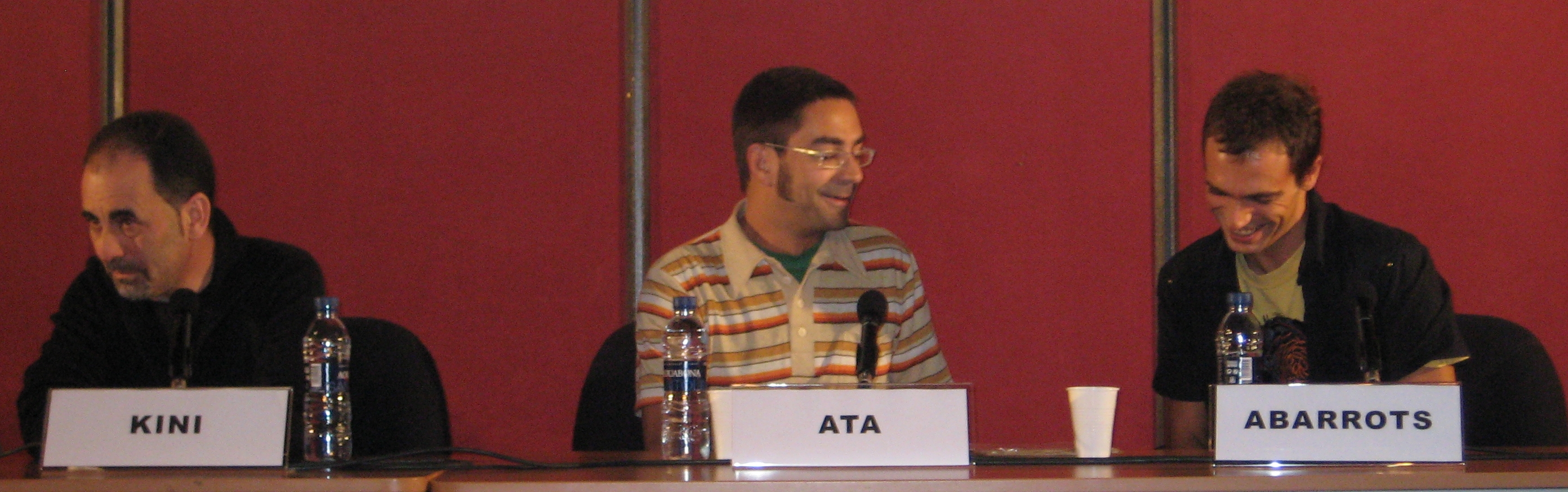 Vitorian comic authors Kini, Ata and Abarrots at a debate about the comic fanzine TMEO at Getxo Comic Con 2007